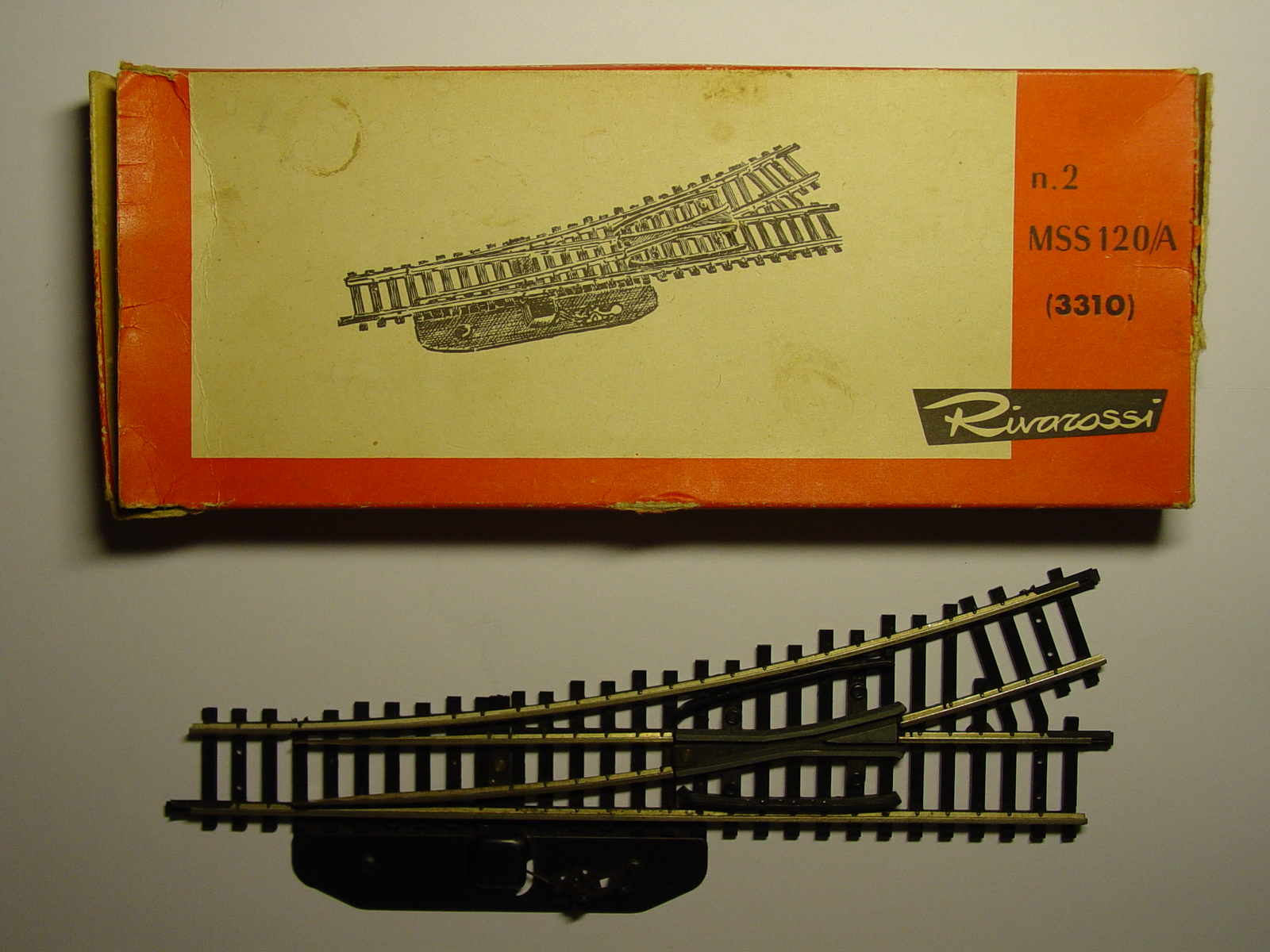 Wissel van Rivarossi (modelspoor).